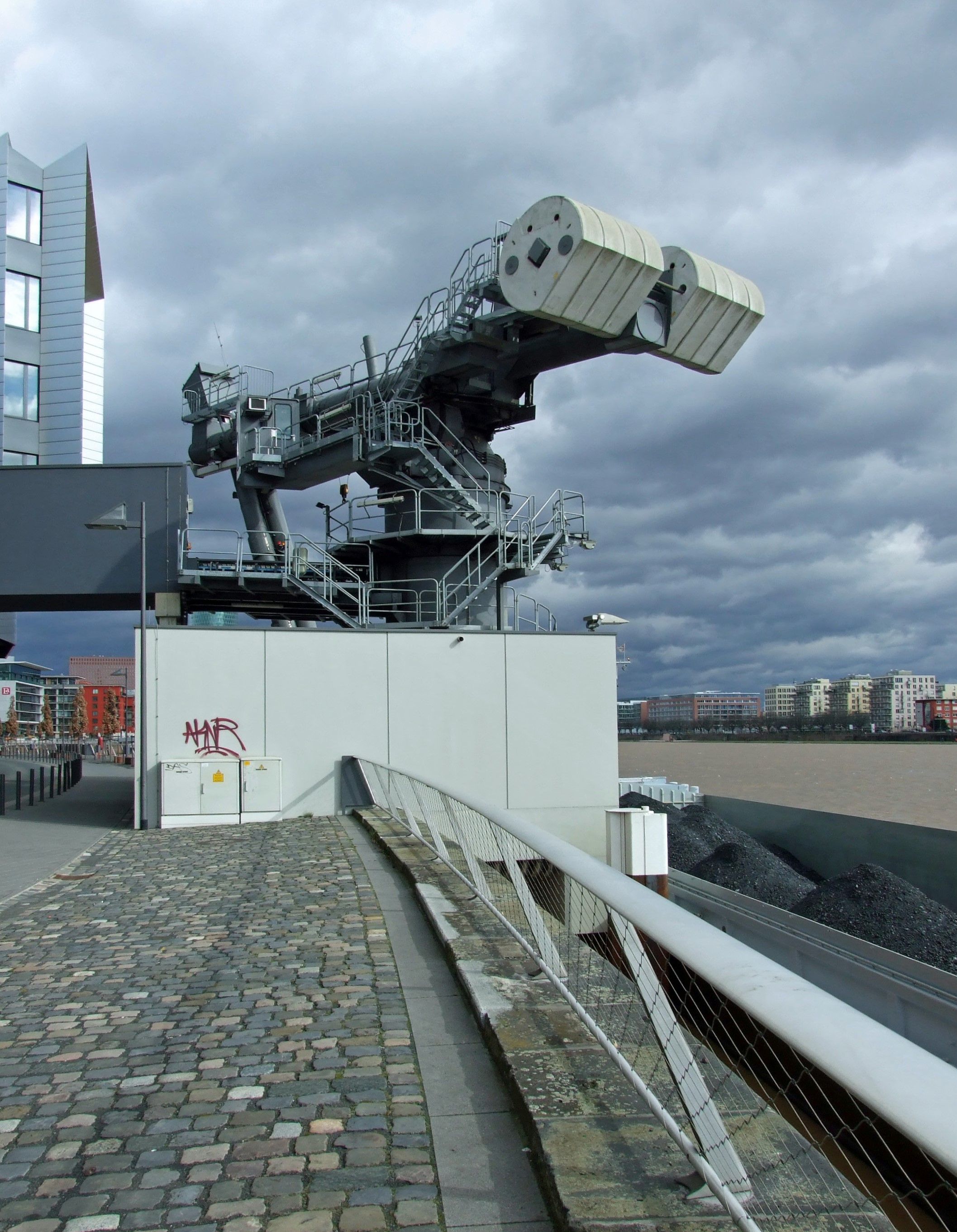 Entladebagger fuer Kohlefrachter, angedockt auf dem Main zwischen „Main-Neckar-Bruecke“ und „Westhafen“, zum Loeschen seiner Kohle fuer das HKW West (mainova) im Gutleut-Viertel